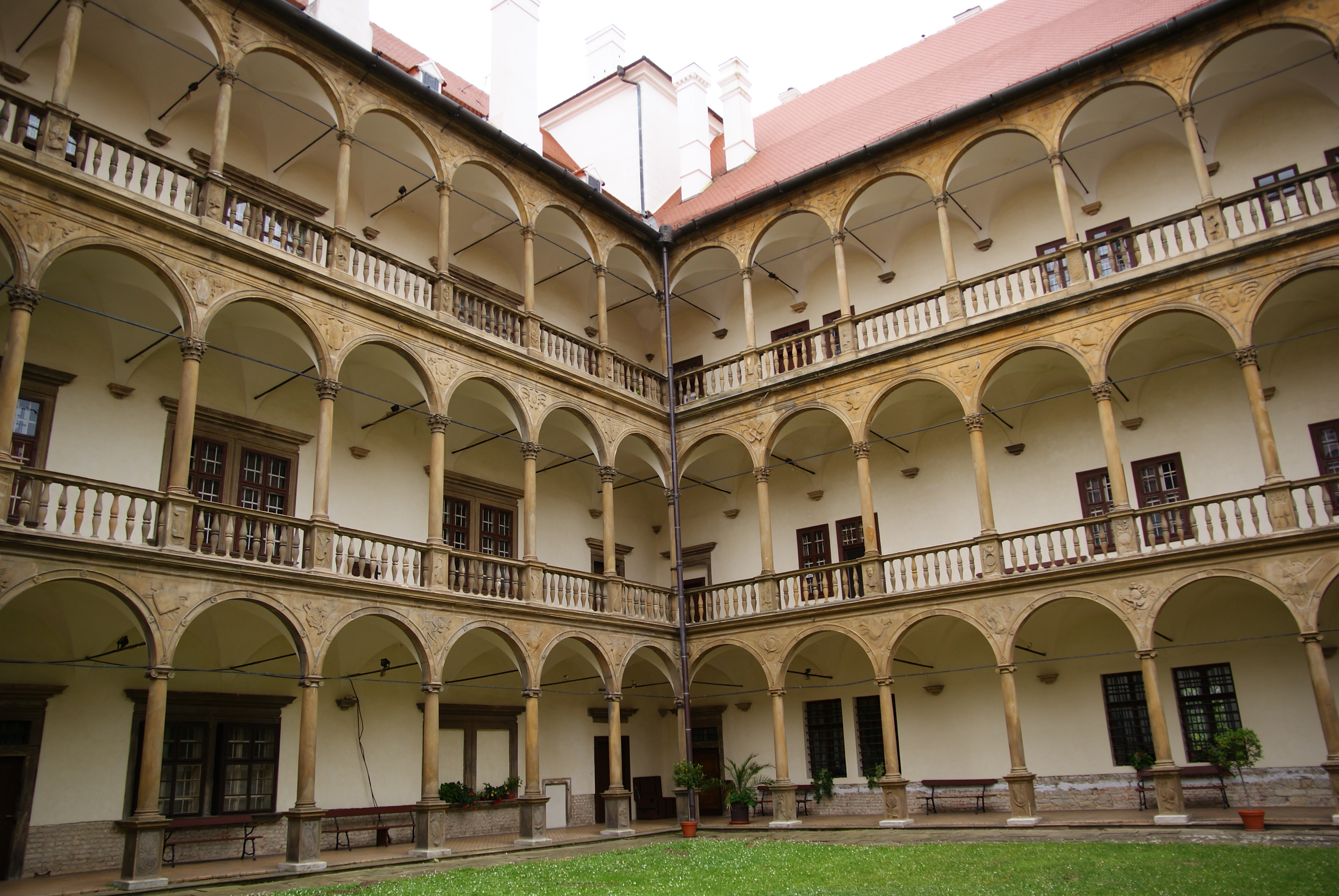 Zámek Bučovice, Zámecká 1, Bučovice